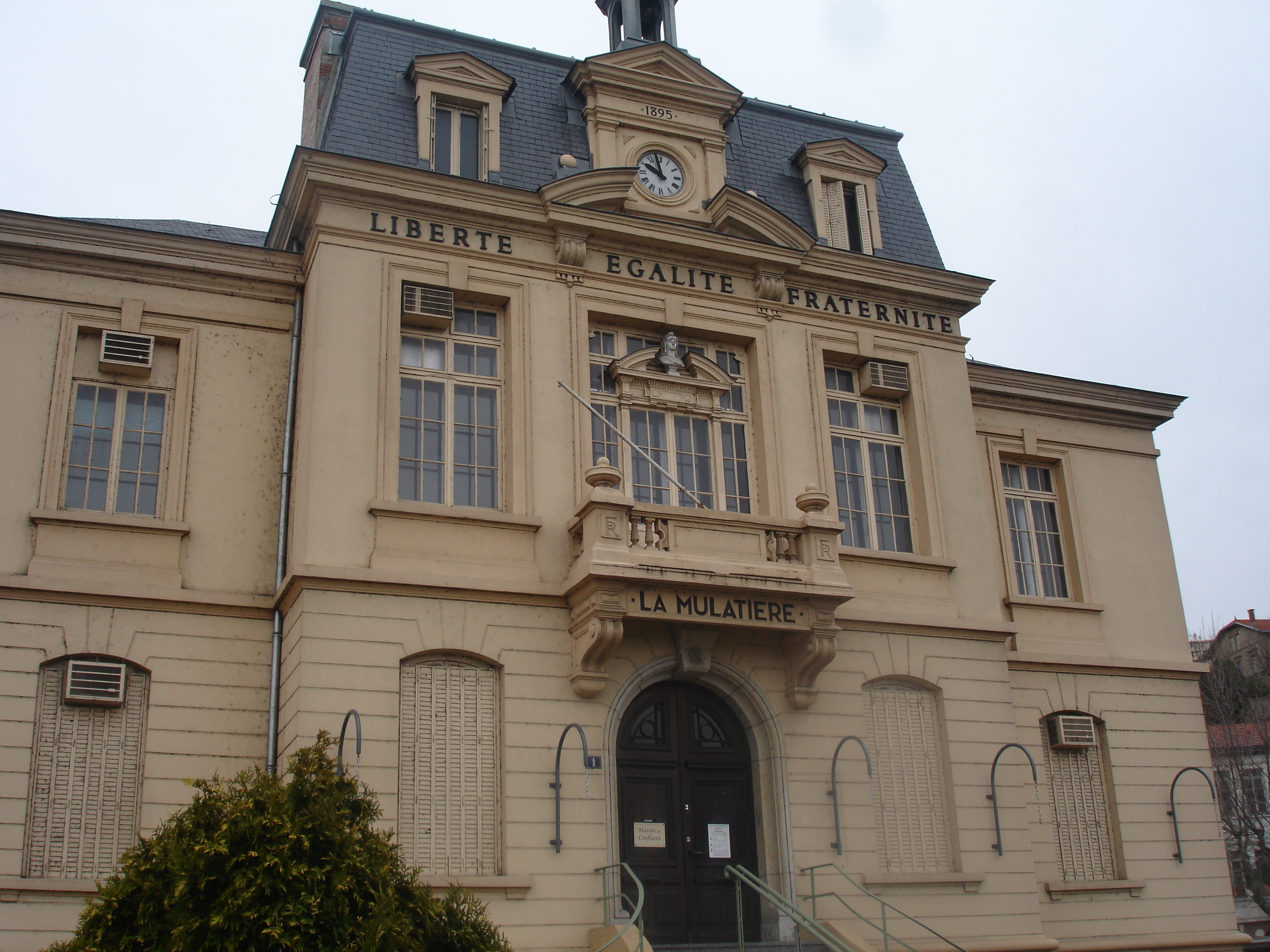 La Mulatière (69) : Maison du Confluent (ancienne mairie)